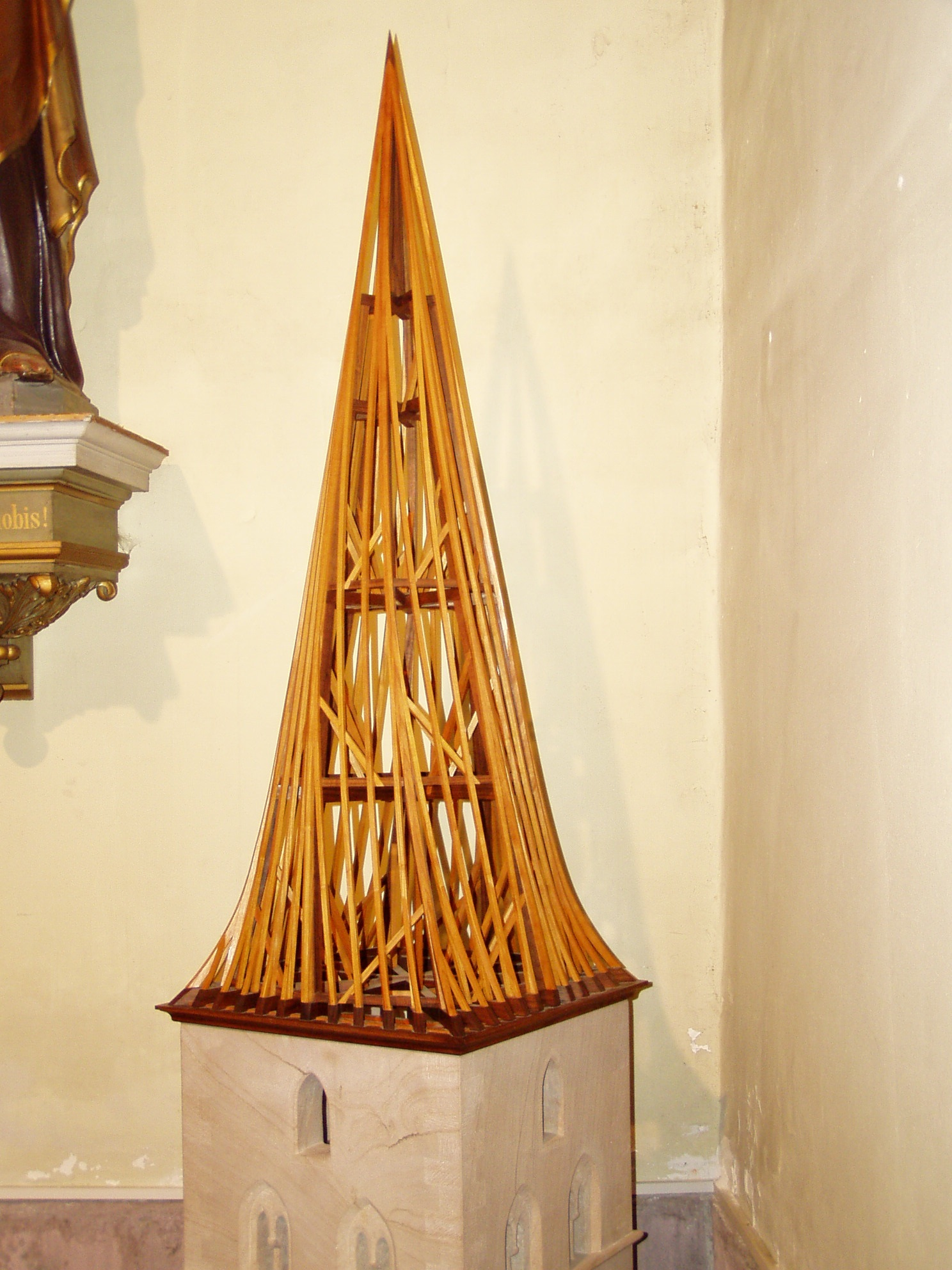 Photographie personnelle de la maquette du clocher tors de l'Ã©glise Saint-Gall de Niedermorschwihr prise le 09 juillet 2006 par Accrochoc